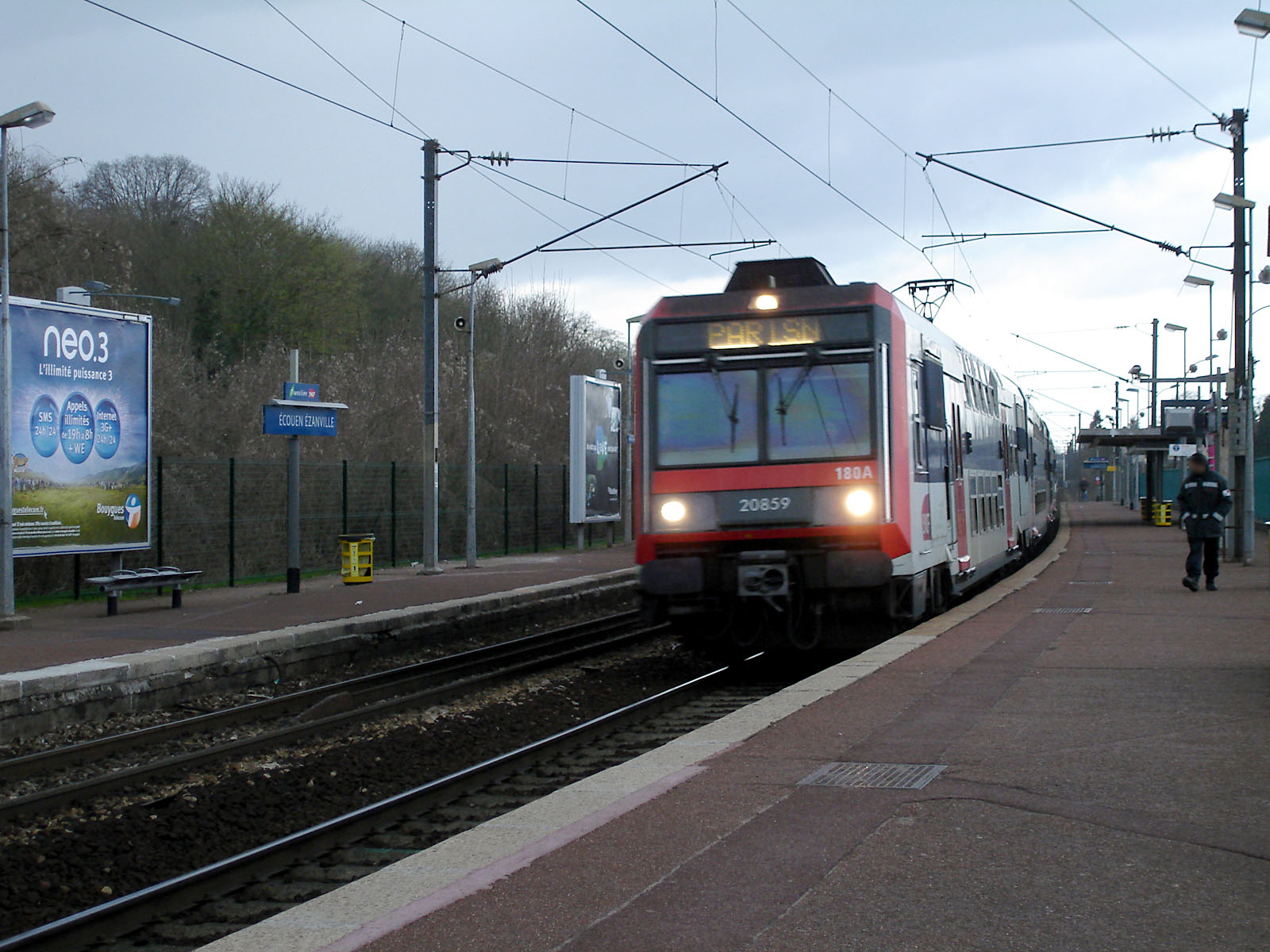 La gare d'Écouen - Ézanville à Ézanville, Val-d'Oise, France.